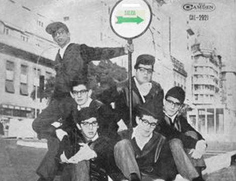 Los Iracundos , foto para el album "Los Iracundos" 1964